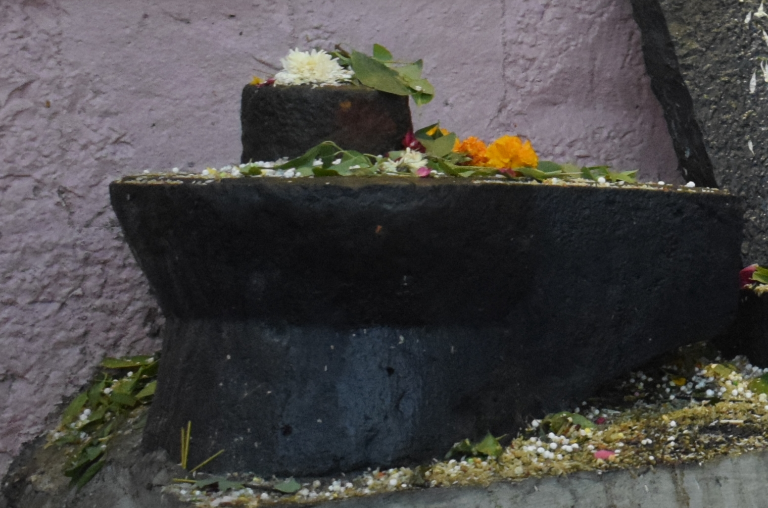 श्री आदि लिंगेश्वर लिंग